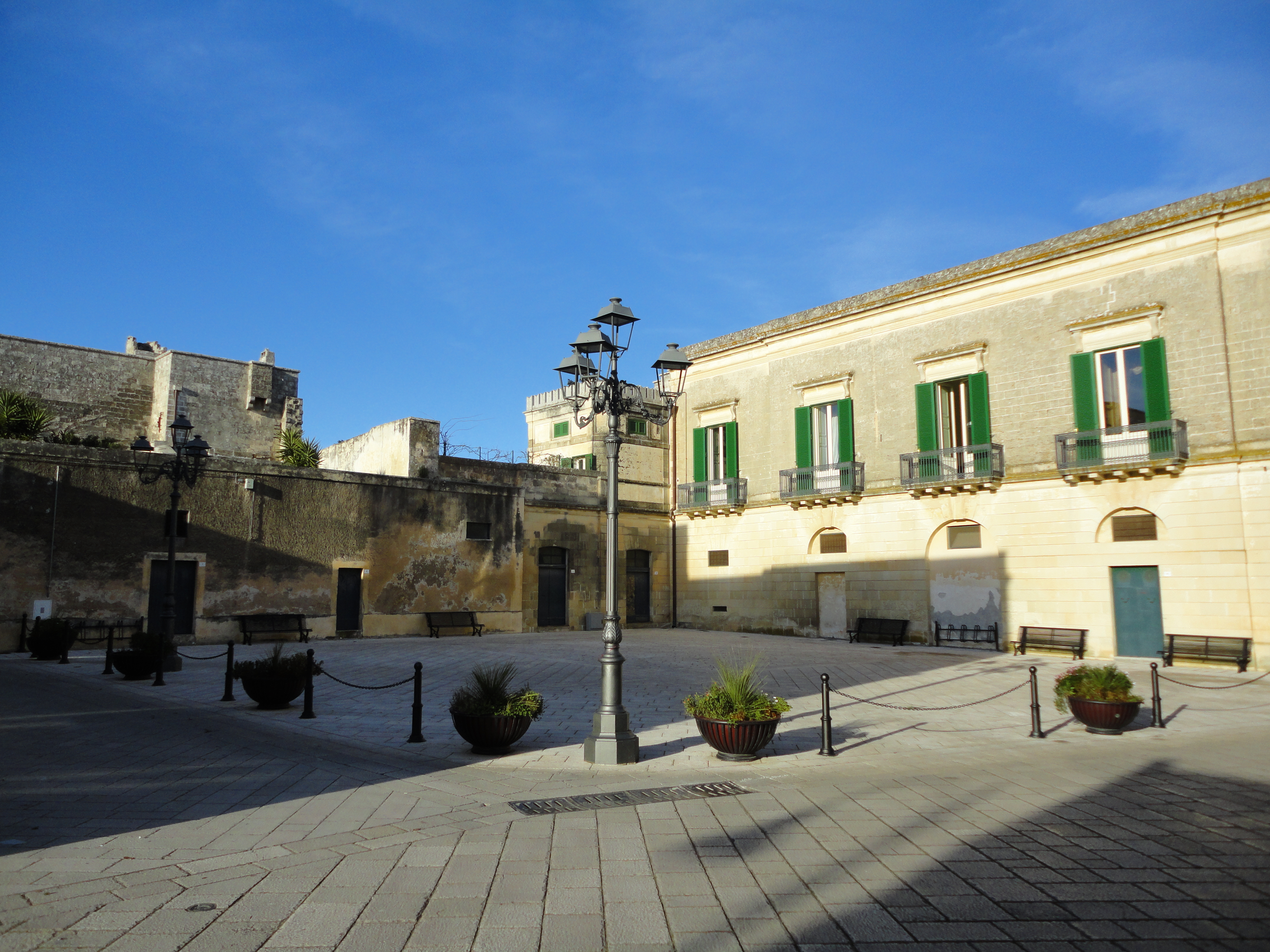 Palazzo Galati e torrione Surano, Lecce